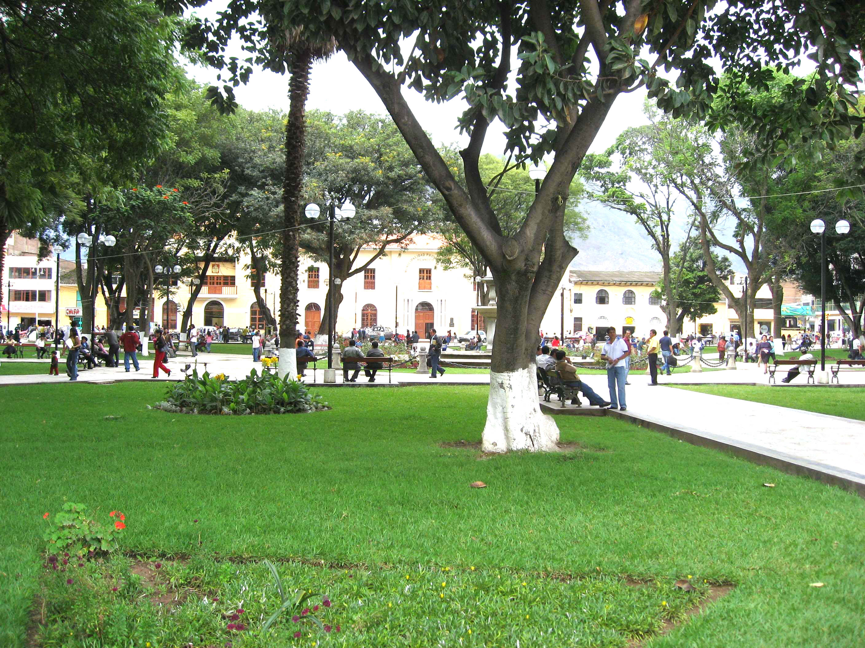 Huanuco Plaza de Armas Peru